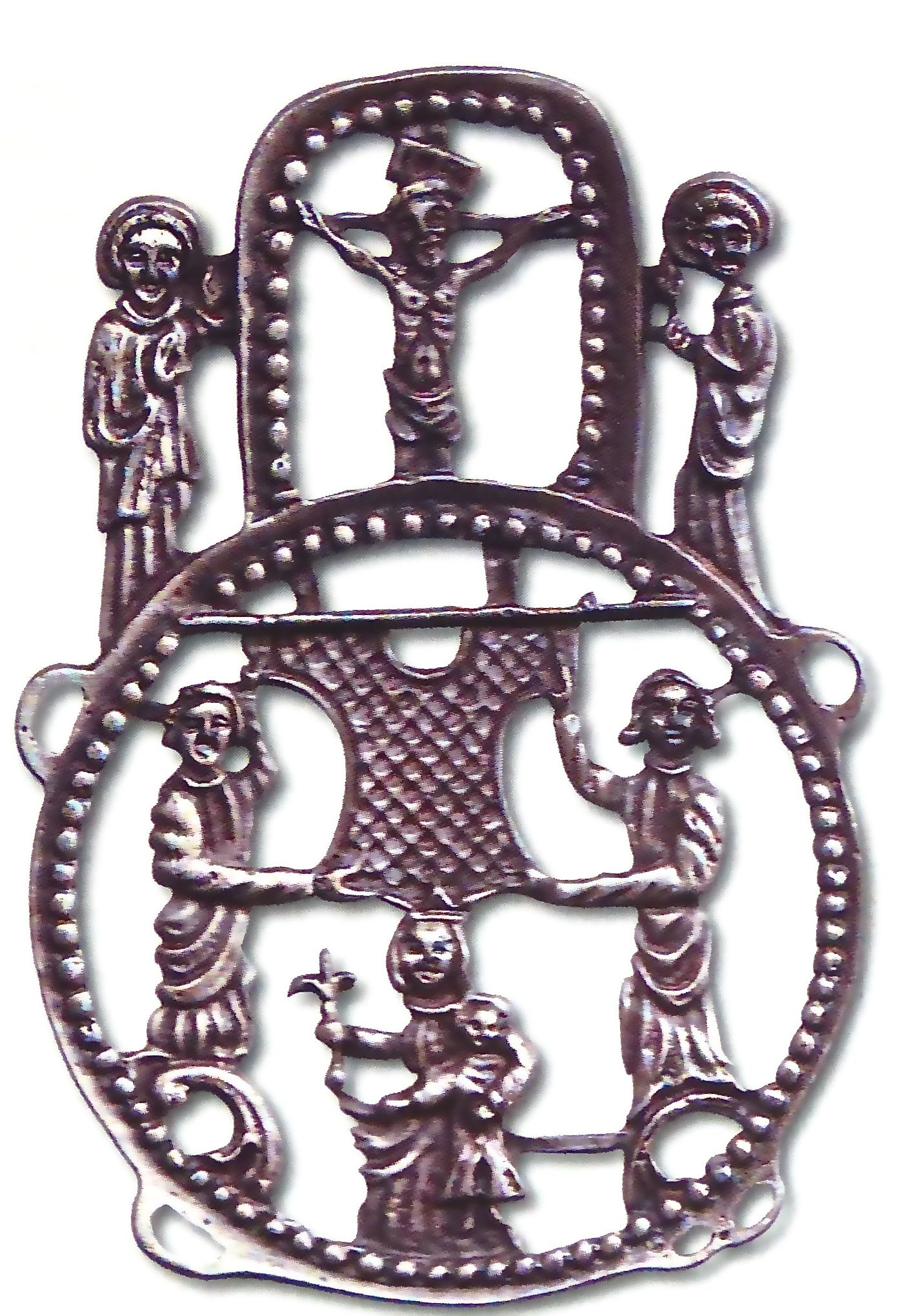 Aachener Pilgerzeichen von 1330, Abguss zur Heiligtumsfahrt 1979